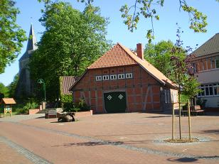 Steimbke